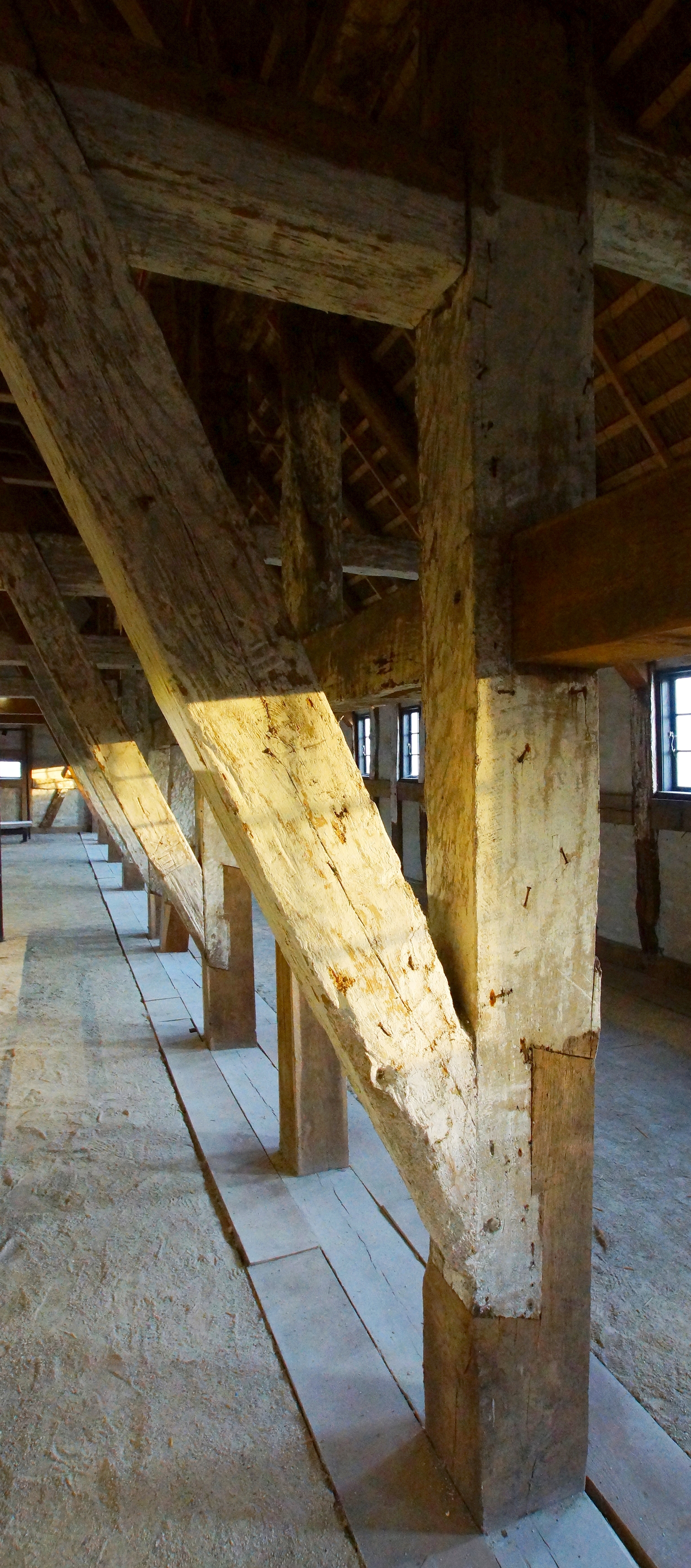 Karlsladen, renoverede egestolper